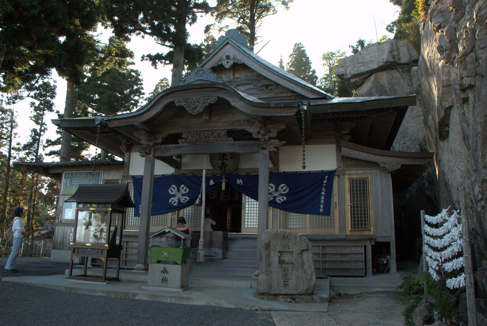 野呂山の弘法寺